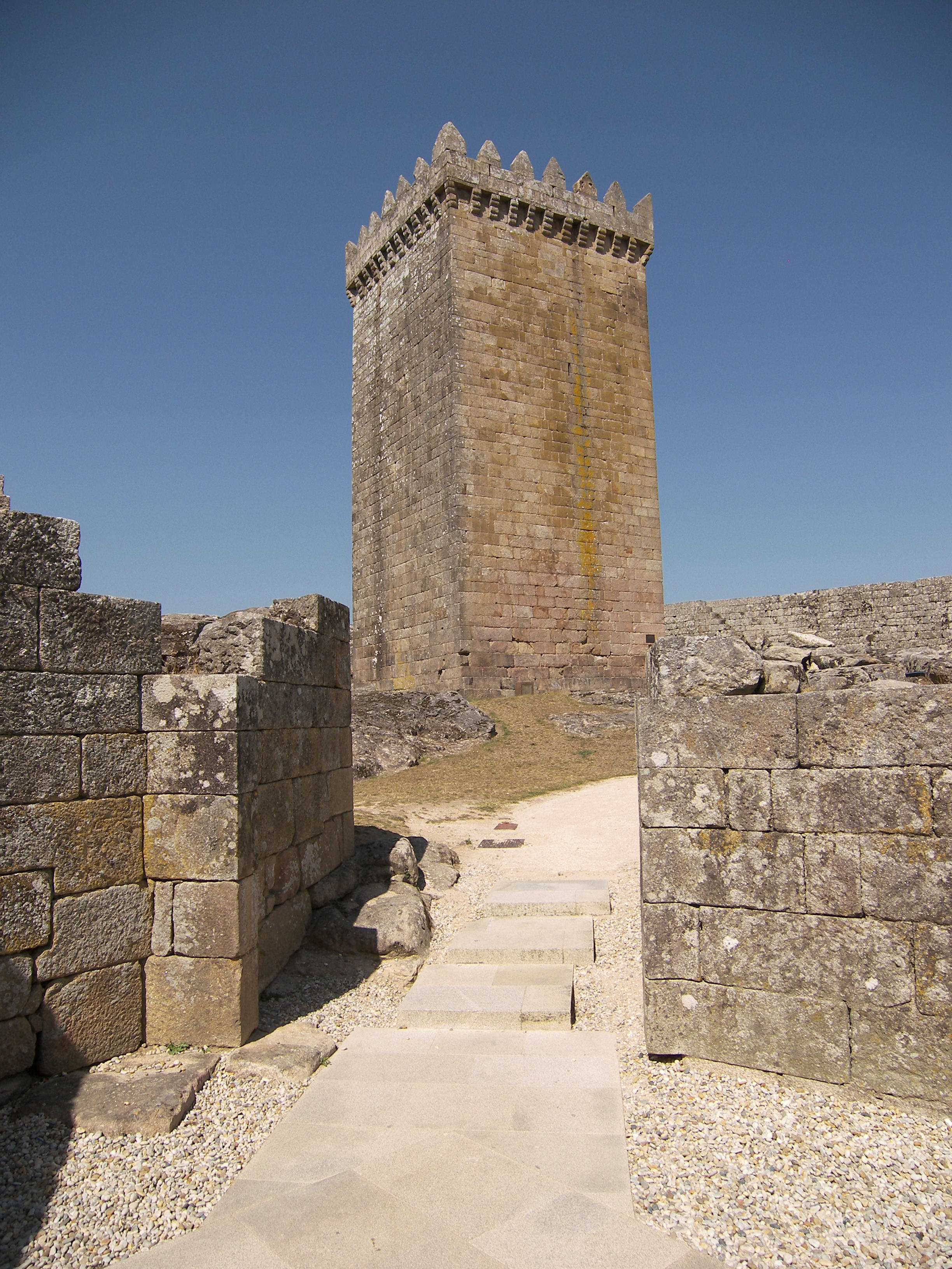 Melgaço, Turm der ehem. Burg